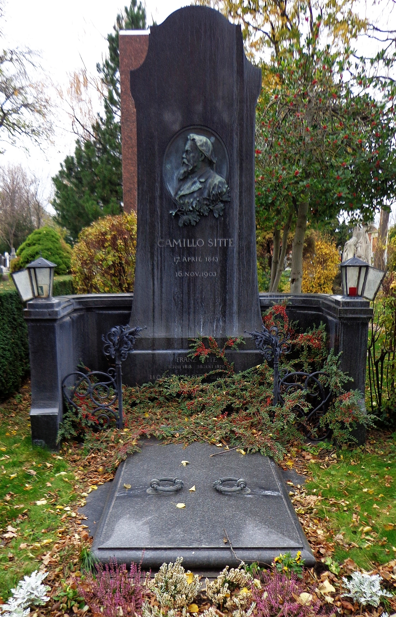 Wiener Zentralfriedhof - Gruppe 14A, Ehrengrab von Camillo Sitte